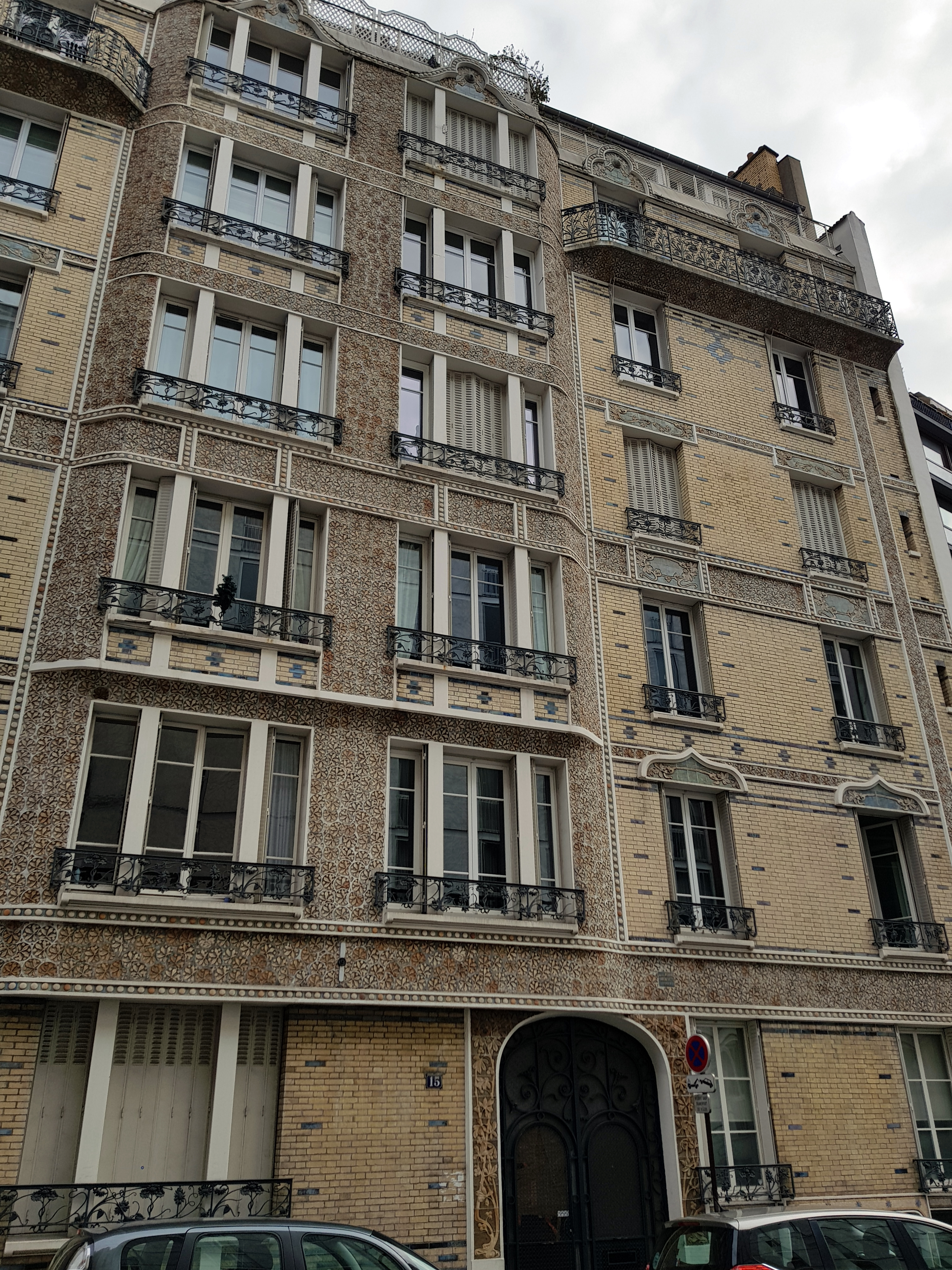 15 avenue Perrichont, Paris 16e.